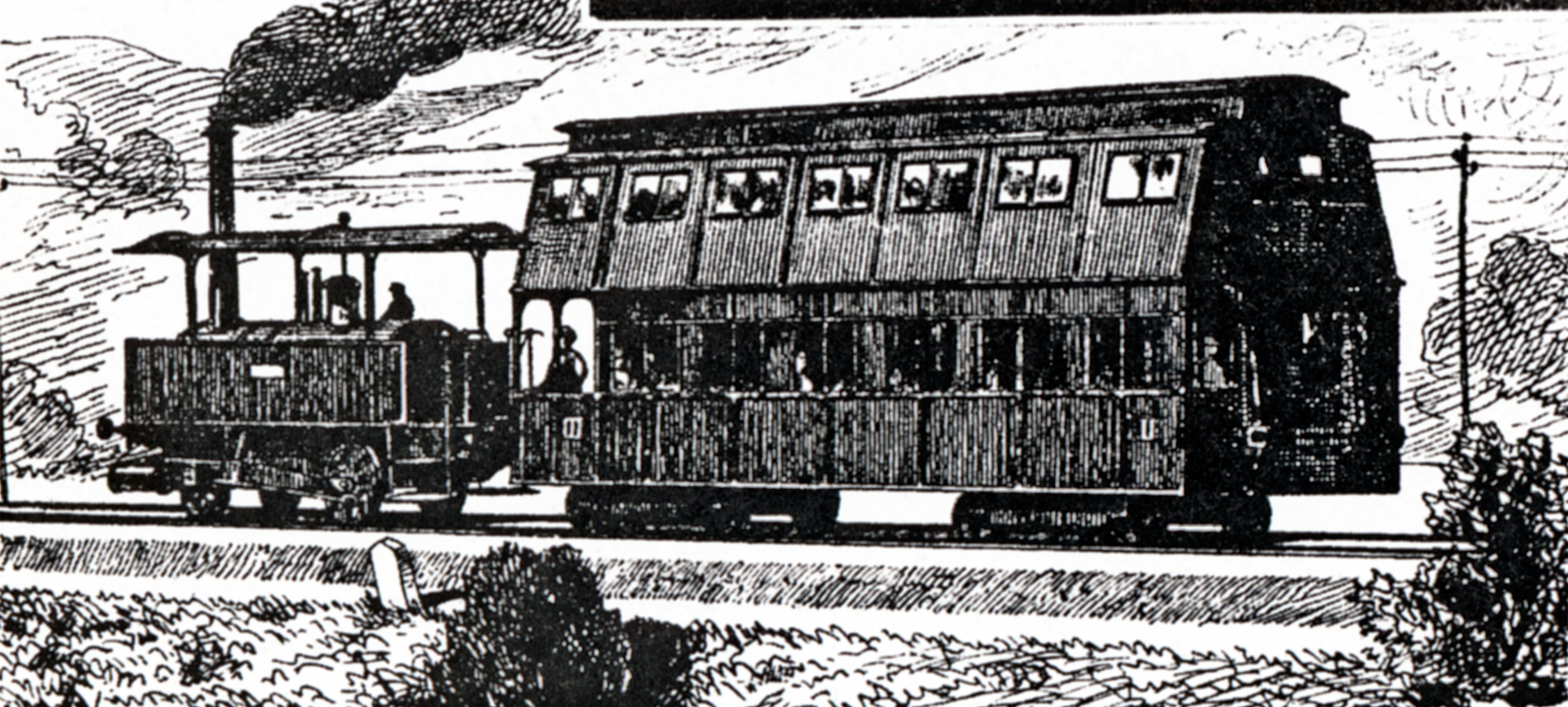 Leobersdorfer Bahn, Dampfomnibus